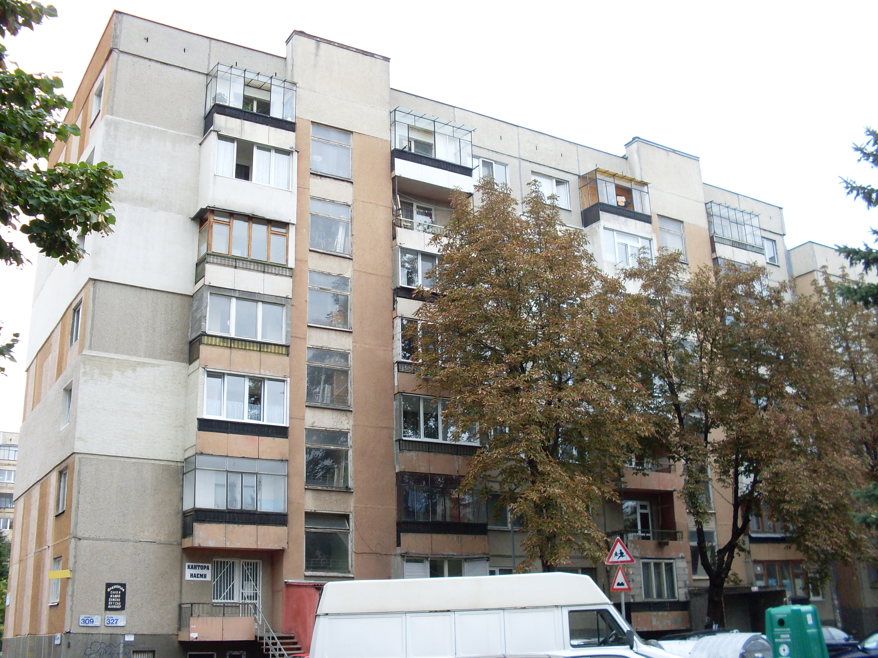 Едропанелна жилищна сграда по номенклатура Бс-2-69 - фасада север/запад.